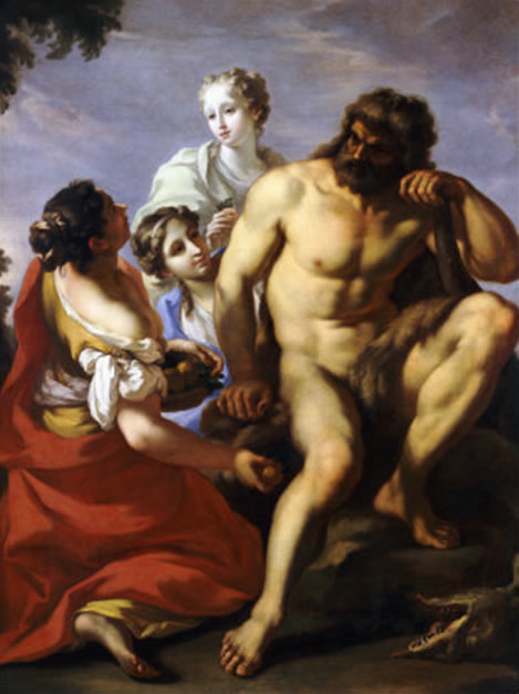 ? × ? cm